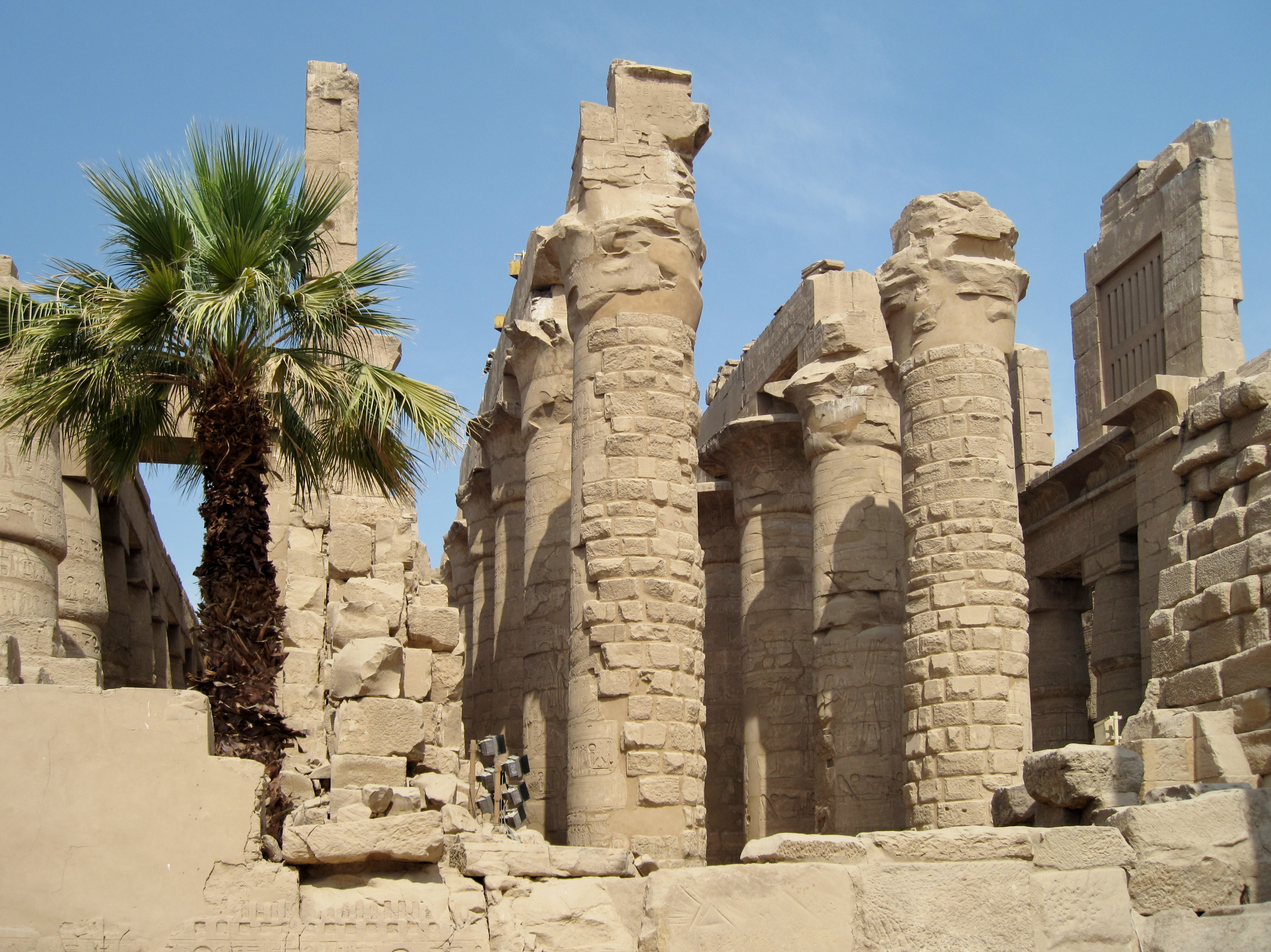 Im Tempel von Karnak nördlich Luxor, Ägypten